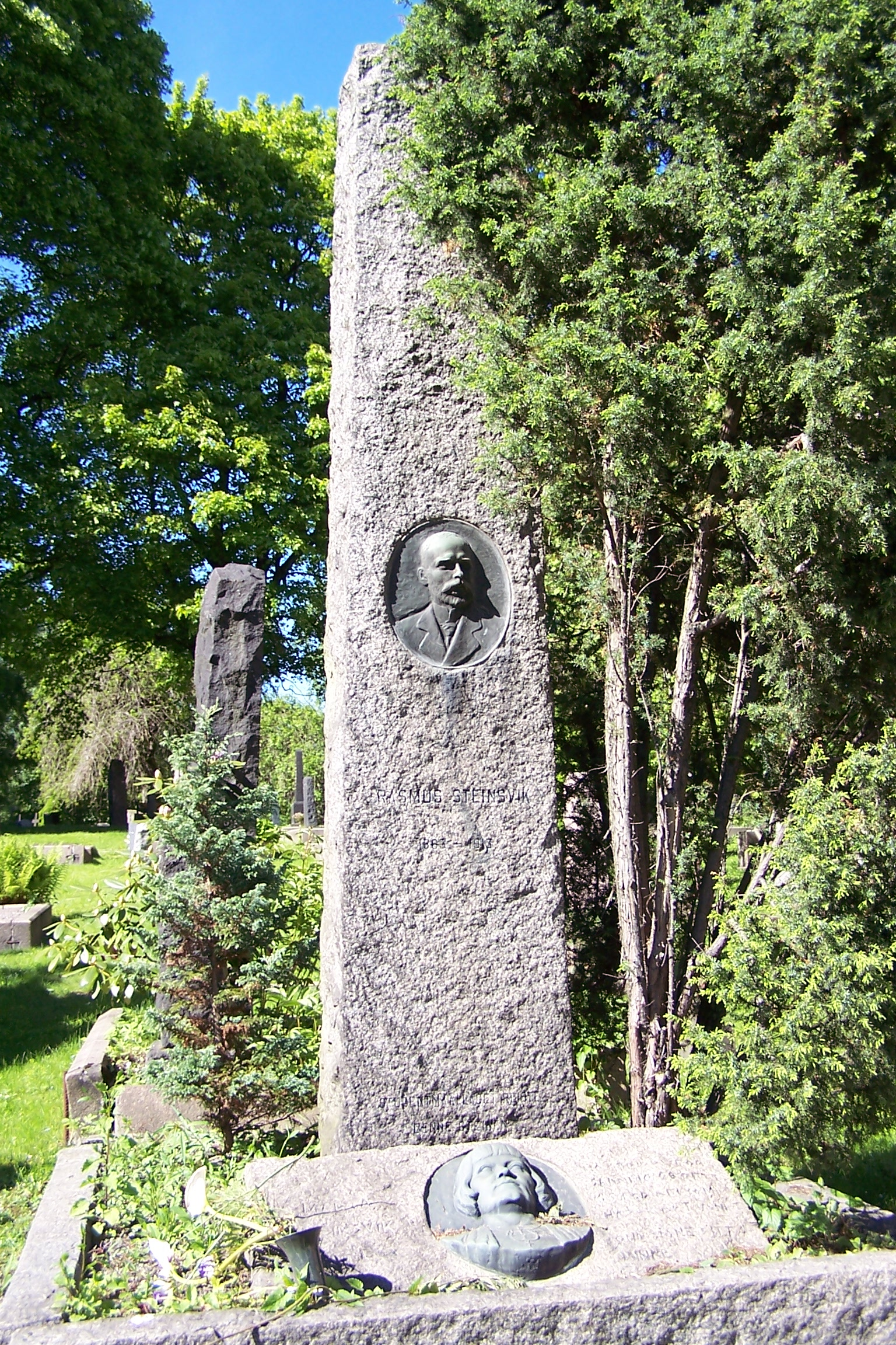 Tomb of Rasmus Olai Steinsvik at Vår Frelsers gravlund, Oslo